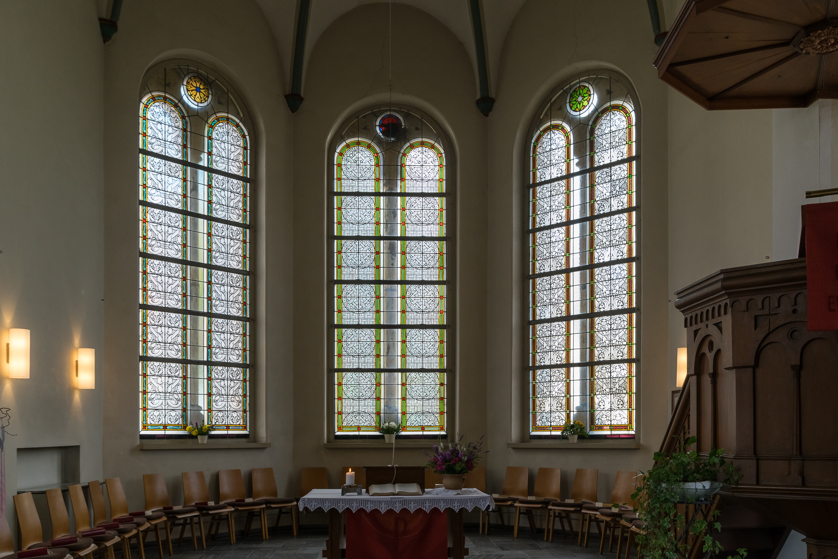 Chor und Buntglasfenster der Glasmalerei Oidtmann von 1878 in der ev.-ref. Kirche Schlangen